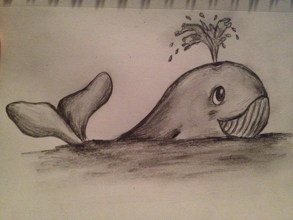 baleine